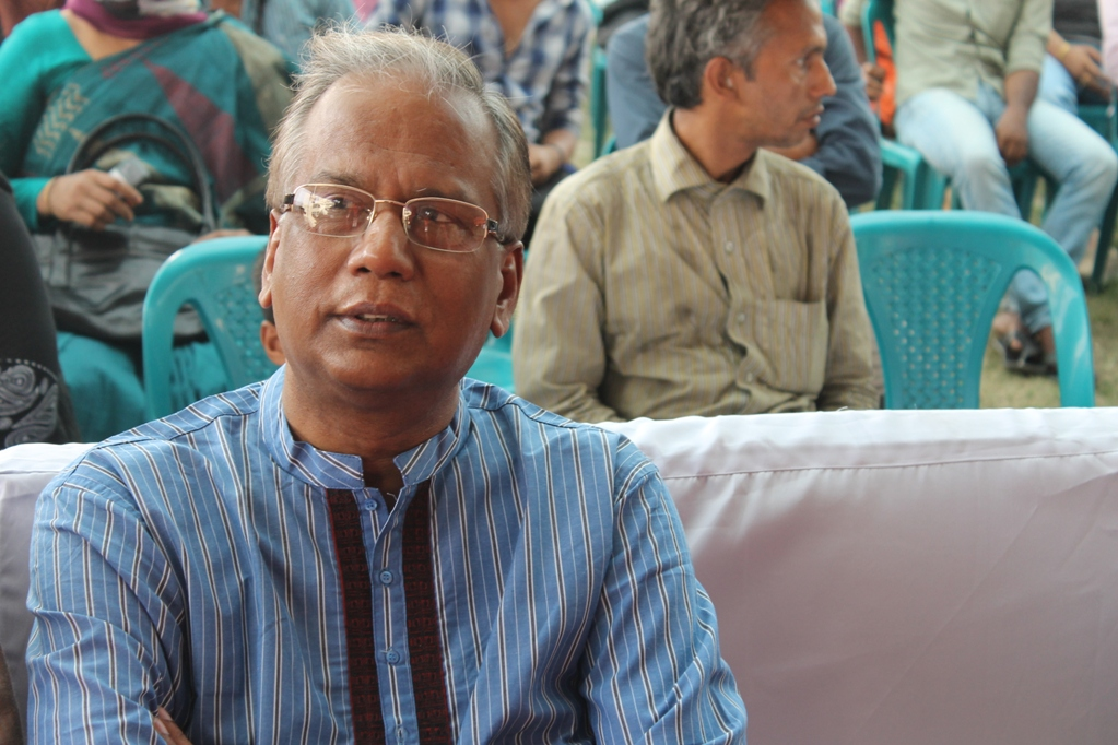 Nasiruddin Yousuf is a media personality of Bangladesh